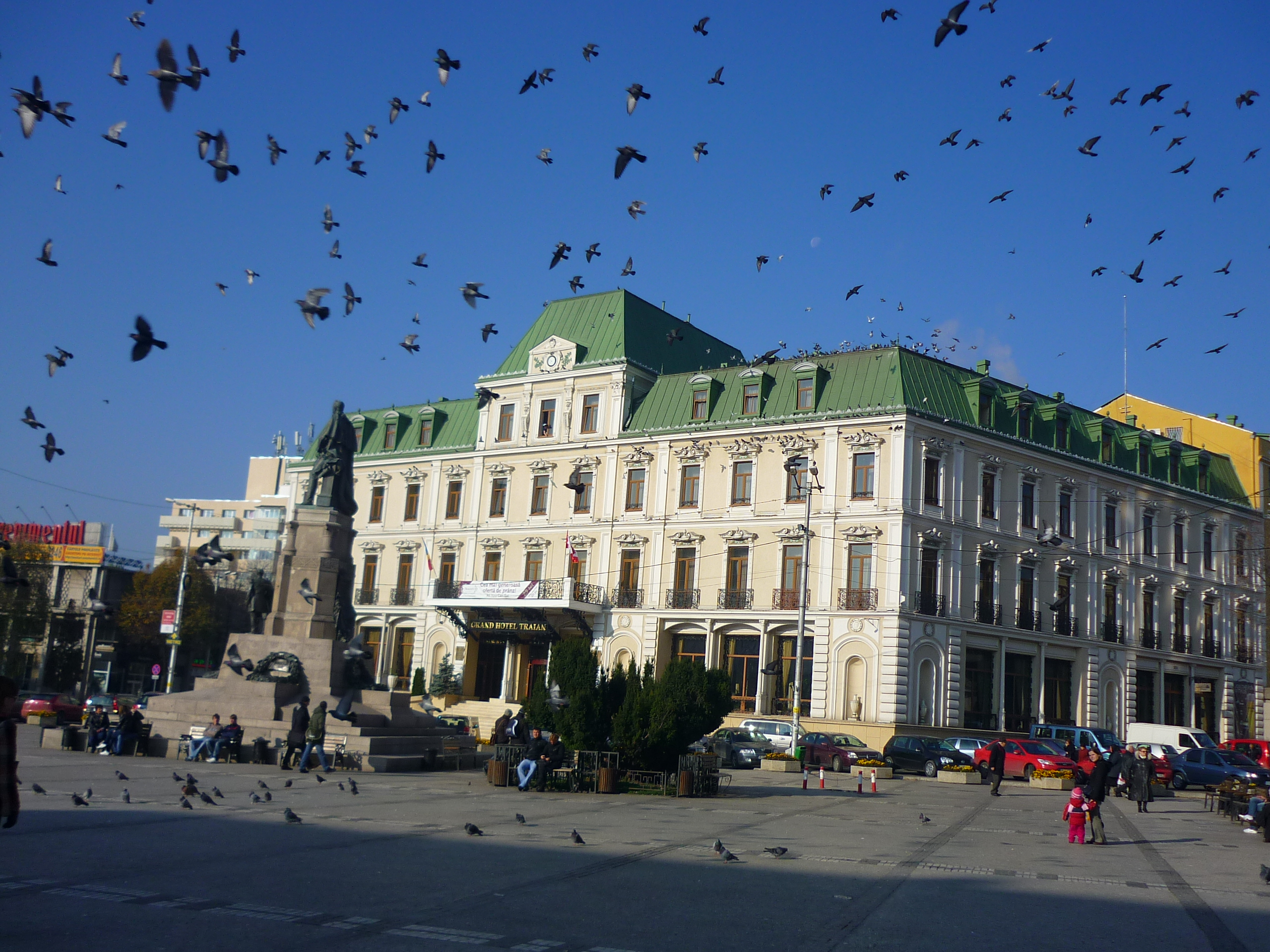 1882 - Aplecat asupra planelor imense, nedespãrtit de uneltele ce l-au consacrat drept "maestru în arta ingineriei", Gustave Eiffel retusa ultimele detalii ale unei veritabile bijuterii arhitectonice. Nu la Paris sau Viena, Saigon ori Statele Unite ale Americii, ci la Iasi, pe pãmânt românesc, într-unul din centrele care a polarizat cunotinele si energiile întregii tãri. Cu doi ani înainte ca acelasi Gustave Eiffel sã devinã celebru prin Statuia Libertãtii, care vegheazã si acum continentul american si cu 7 ani înainte sã înalte Turnul din Paris, care îi poartã numele, la Iasi, în Piata Unirii, dupã planurile maestrului din Cote d´Or un edificiu cu influentã neoclasicã prindea viatã: Marele Hotel TRAÍAN.